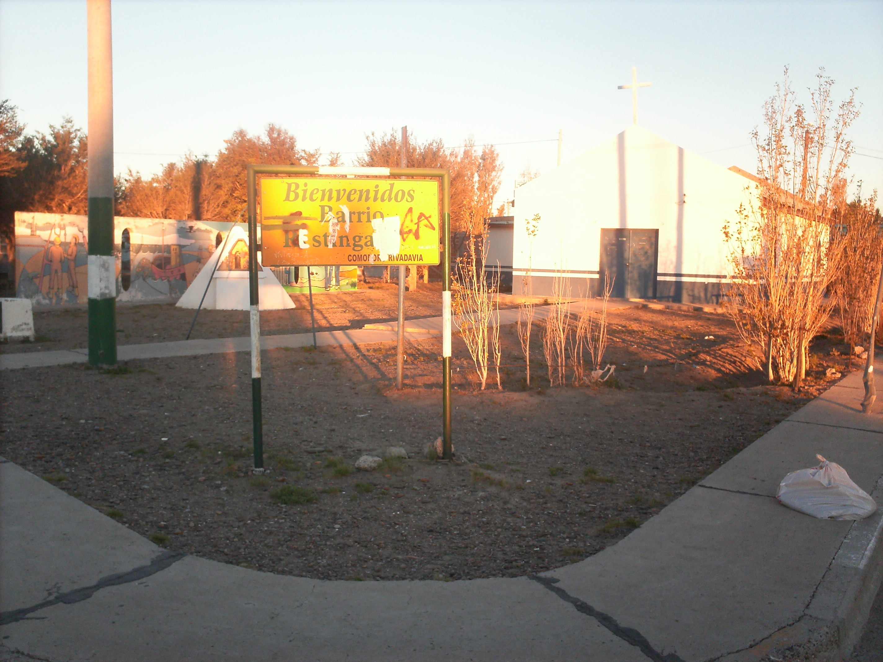 la entrada al restinda